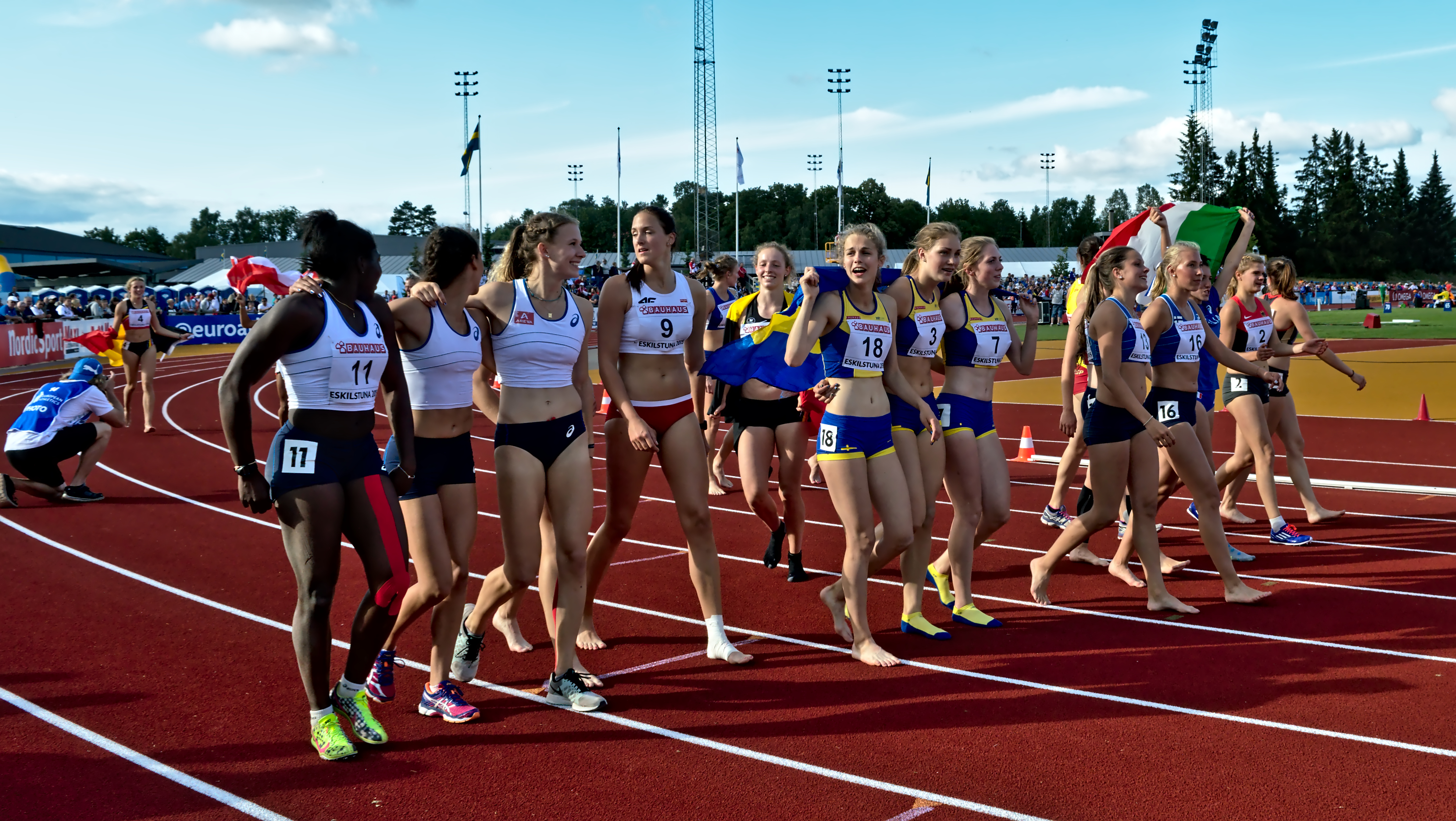 Sjukampare i ett gemensamt ärevarv efter avslutad tävling vid junior-EM 2015.